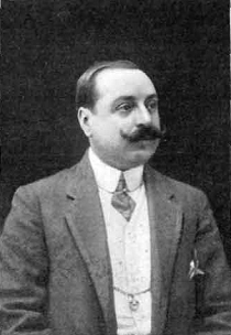 Retrato de Narciso Méndez Bringa, en la revista La Ilustración Artística.